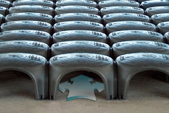 Vespaio ventilato con casseforme a perdere Iglù